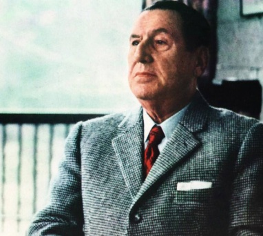 Perón de traje, años antes de su muerte en 1973, en ejercicio de la presidencia.